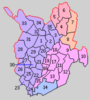 栃木県下都賀郡の町村。